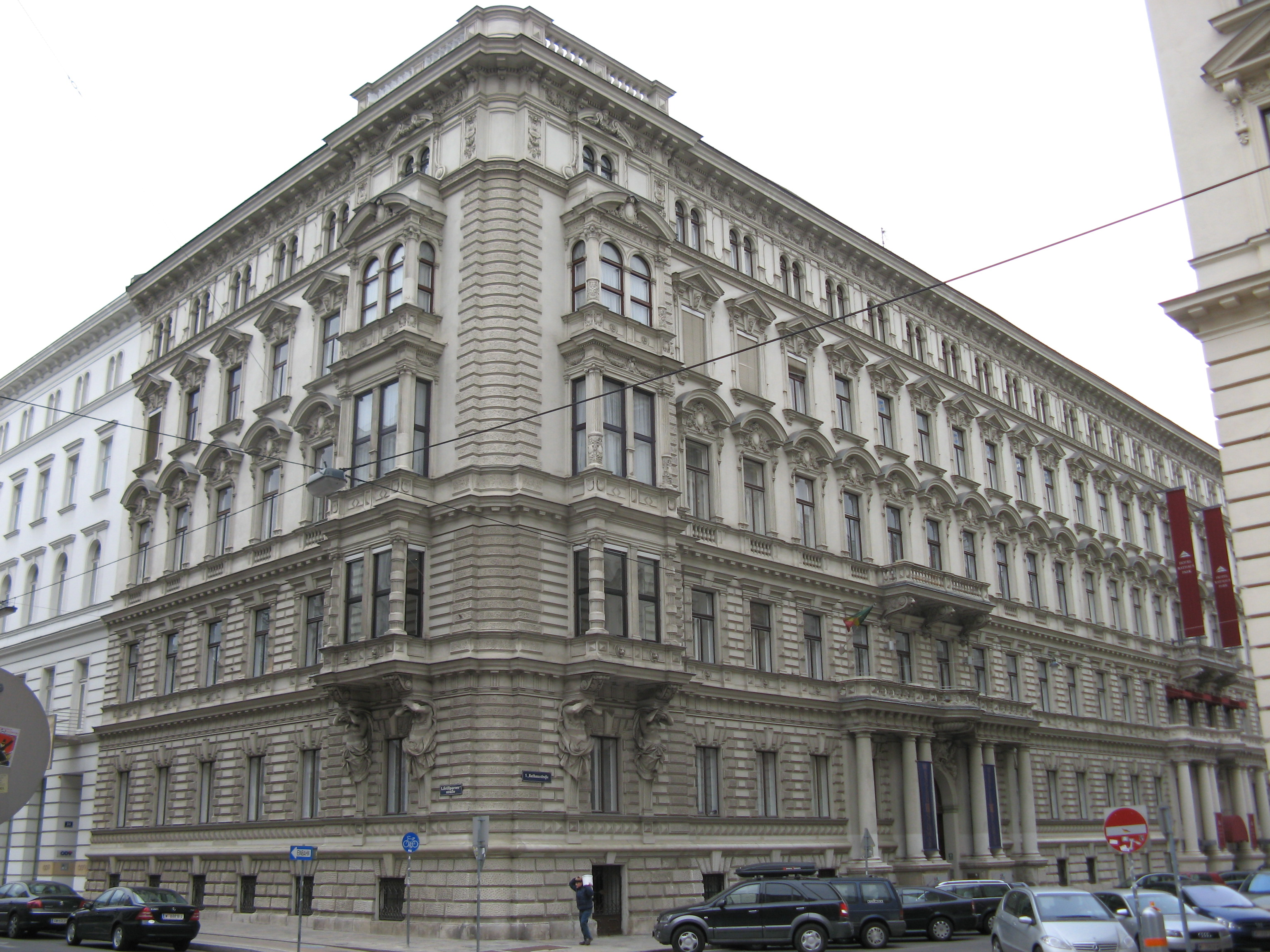 hemaliges Haus Königswarter (1881) von Wilhelm Stiassny in der Rathausstraße 15-17 in Wien-Innere Stadt